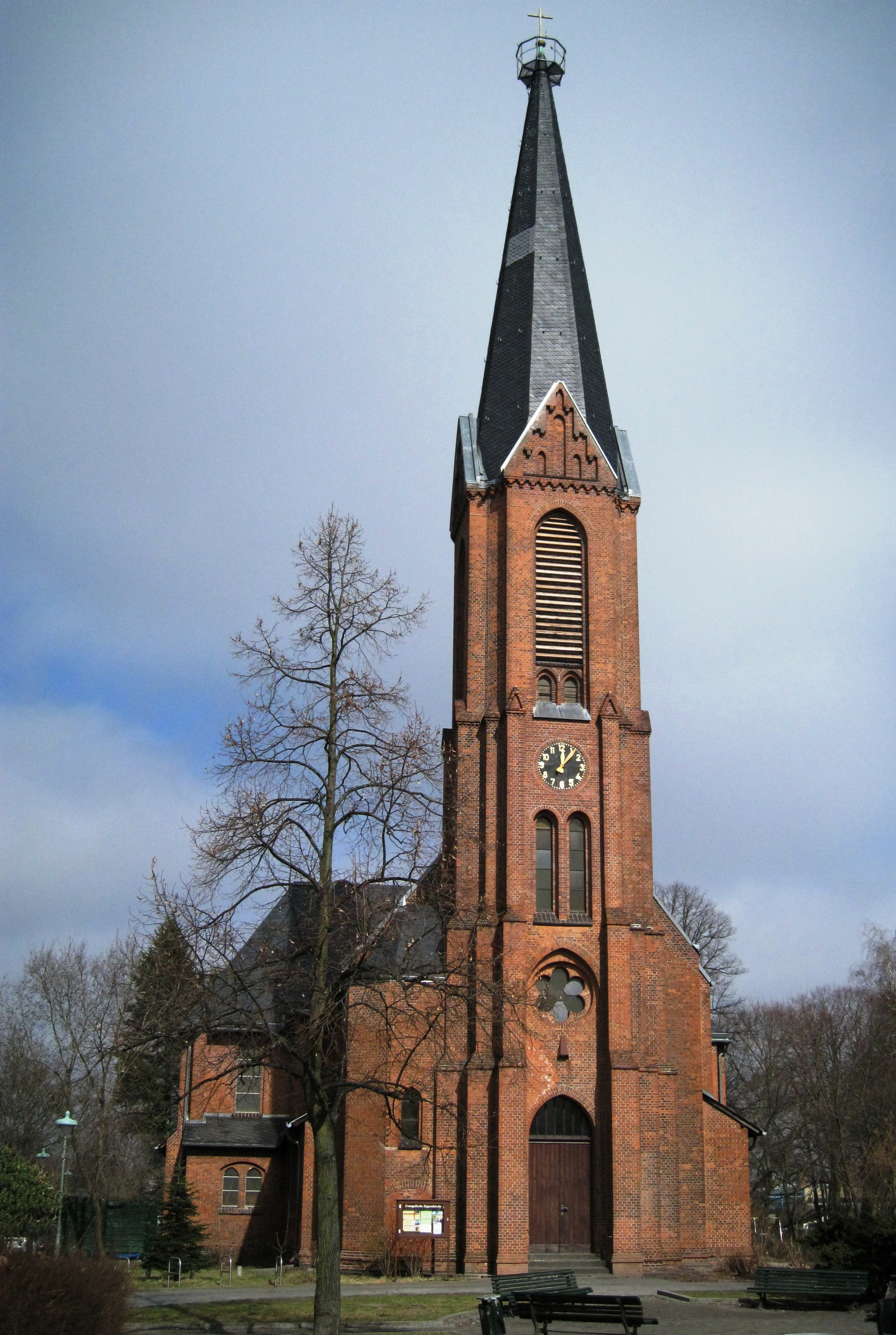 Portal der Segenskirche (Berlin-Reinickendorf), nach Norden fotografiert